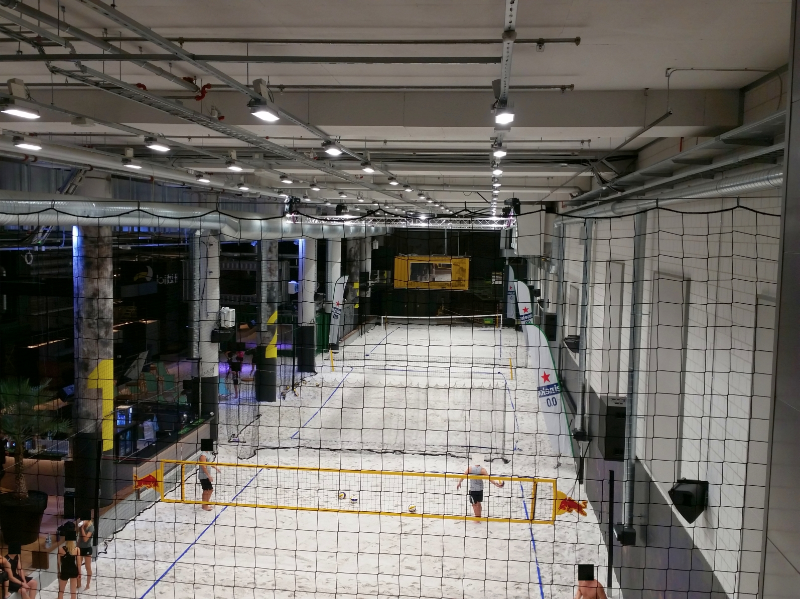 Pasilan suunnitellun metroaseman tiloihin rakennettu sisäliikuntakeskus jossa on mahdollisuus pelata rantalentopalloa ja harrastaa surffausta.